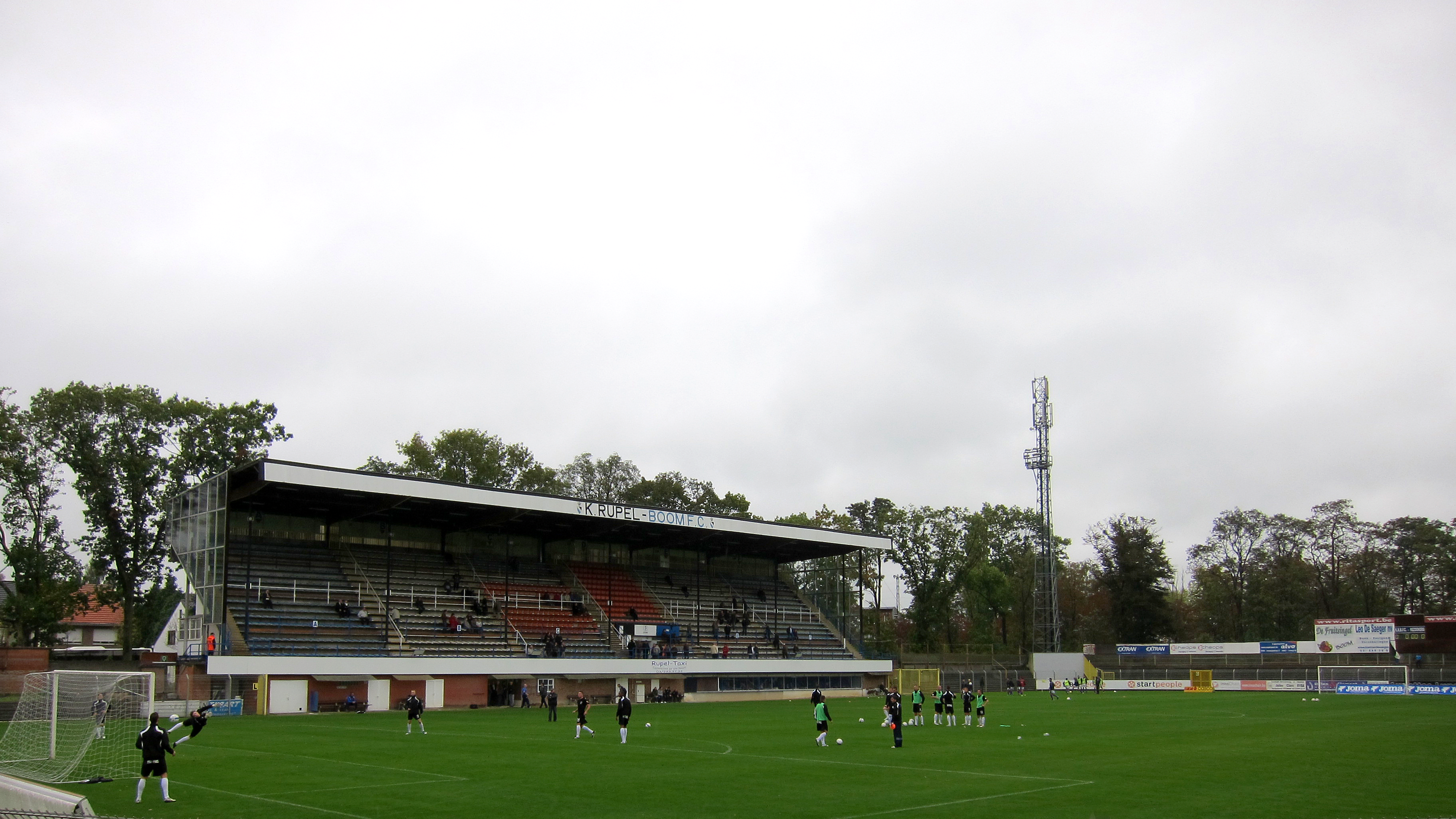 Het voetbalstadion van Rupel Boom FC te Boom, België